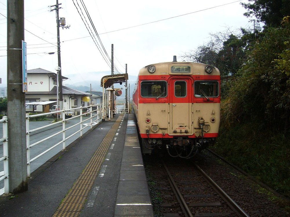 予讃線西大洲駅 国鉄色キハ58が発車